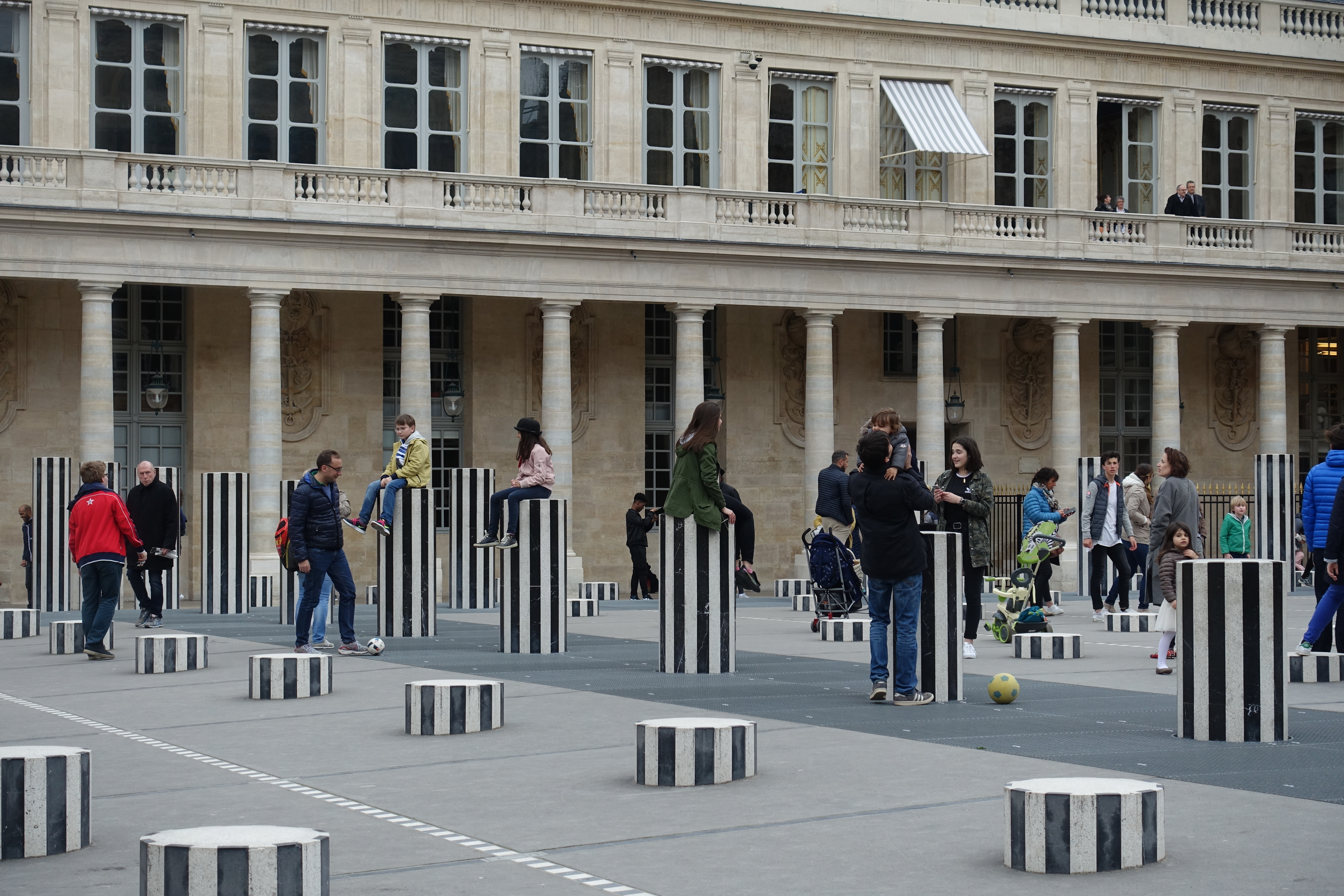 Colonnes de Buren @ Palais Royal @ Paris